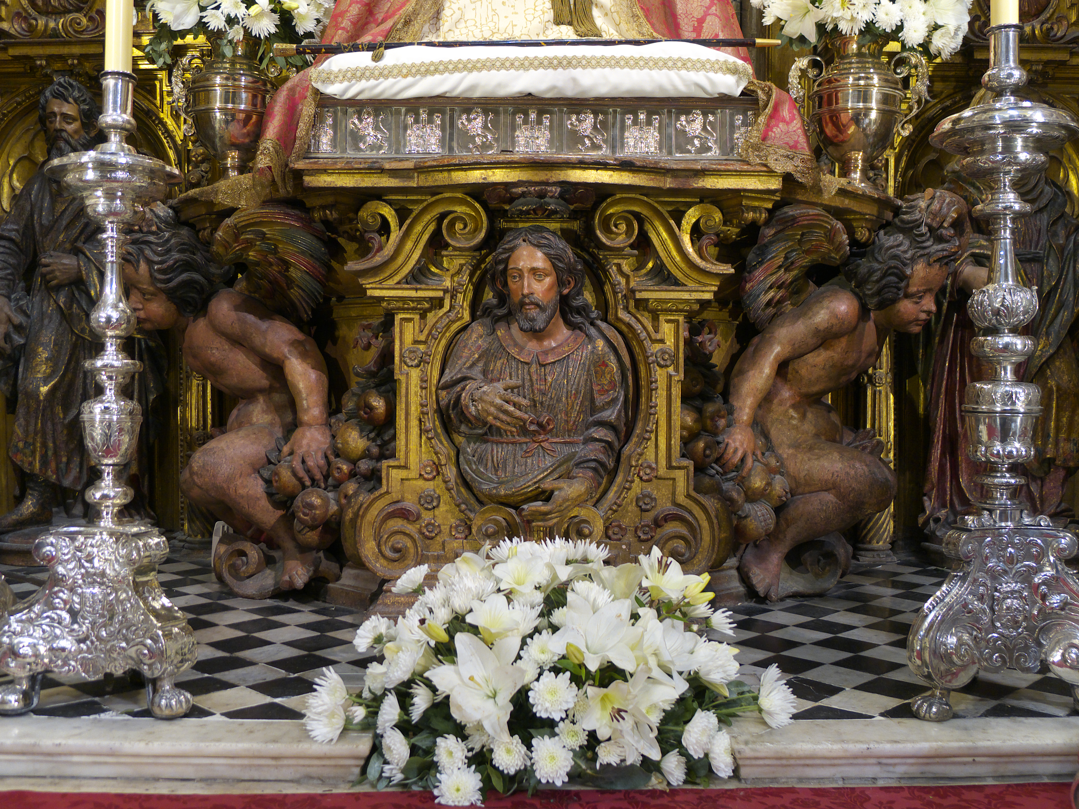 Detalle del retablo de la Virgen de los Reyes. Capilla Real de la Catedral de Sevilla. Escultor, Luis Ortiz de Vargas (1648)